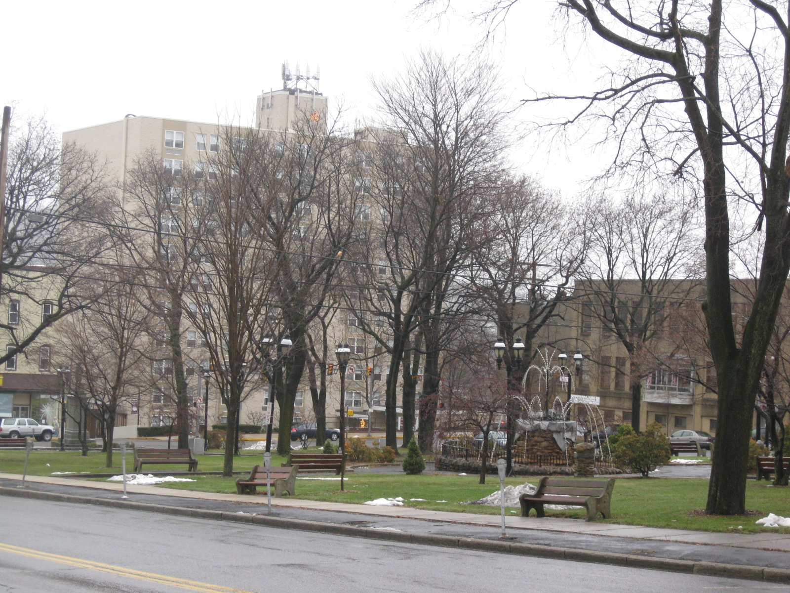 Lehighton, Pennsylvania